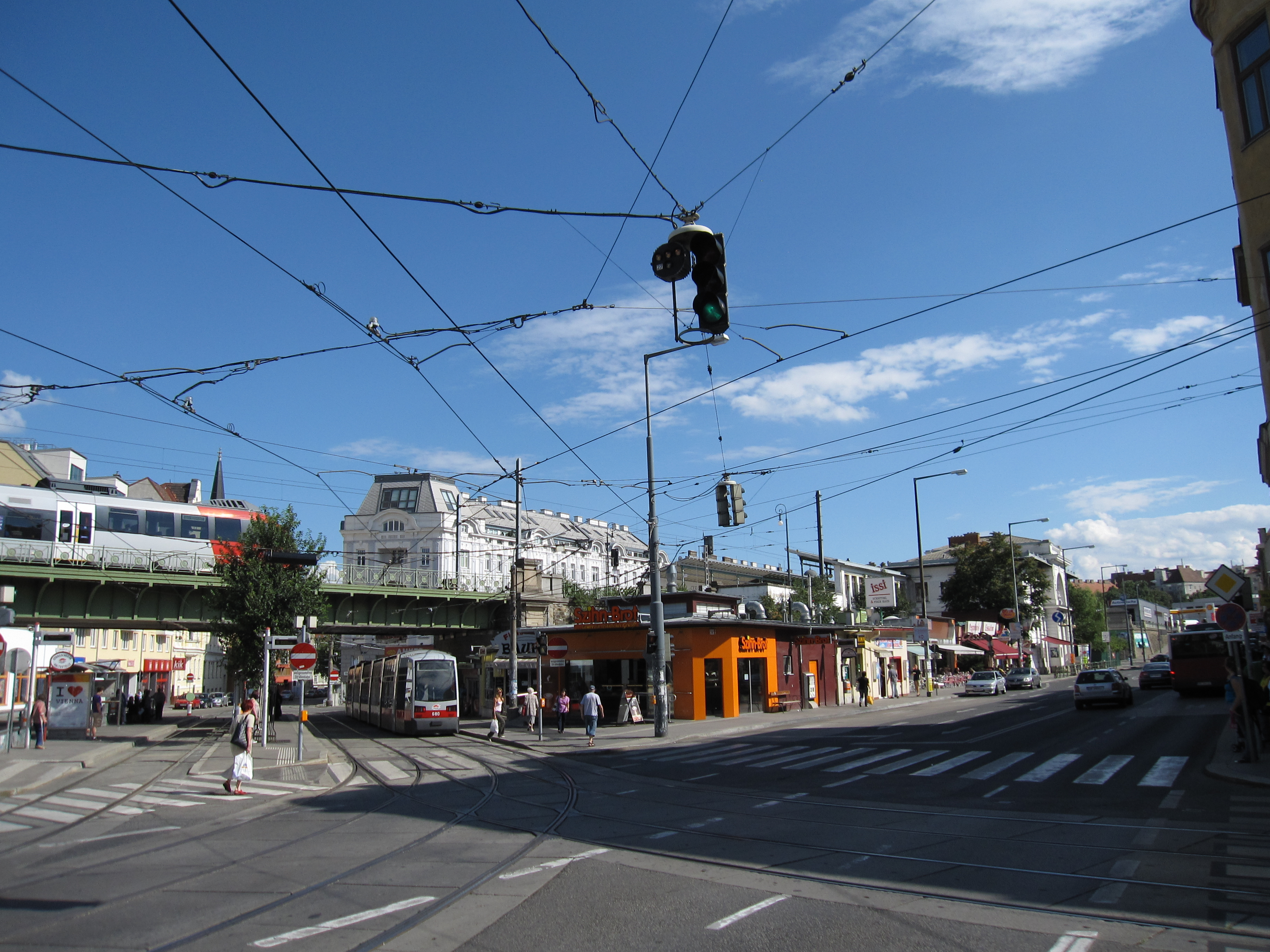 Bahnhof Wien Gersthof